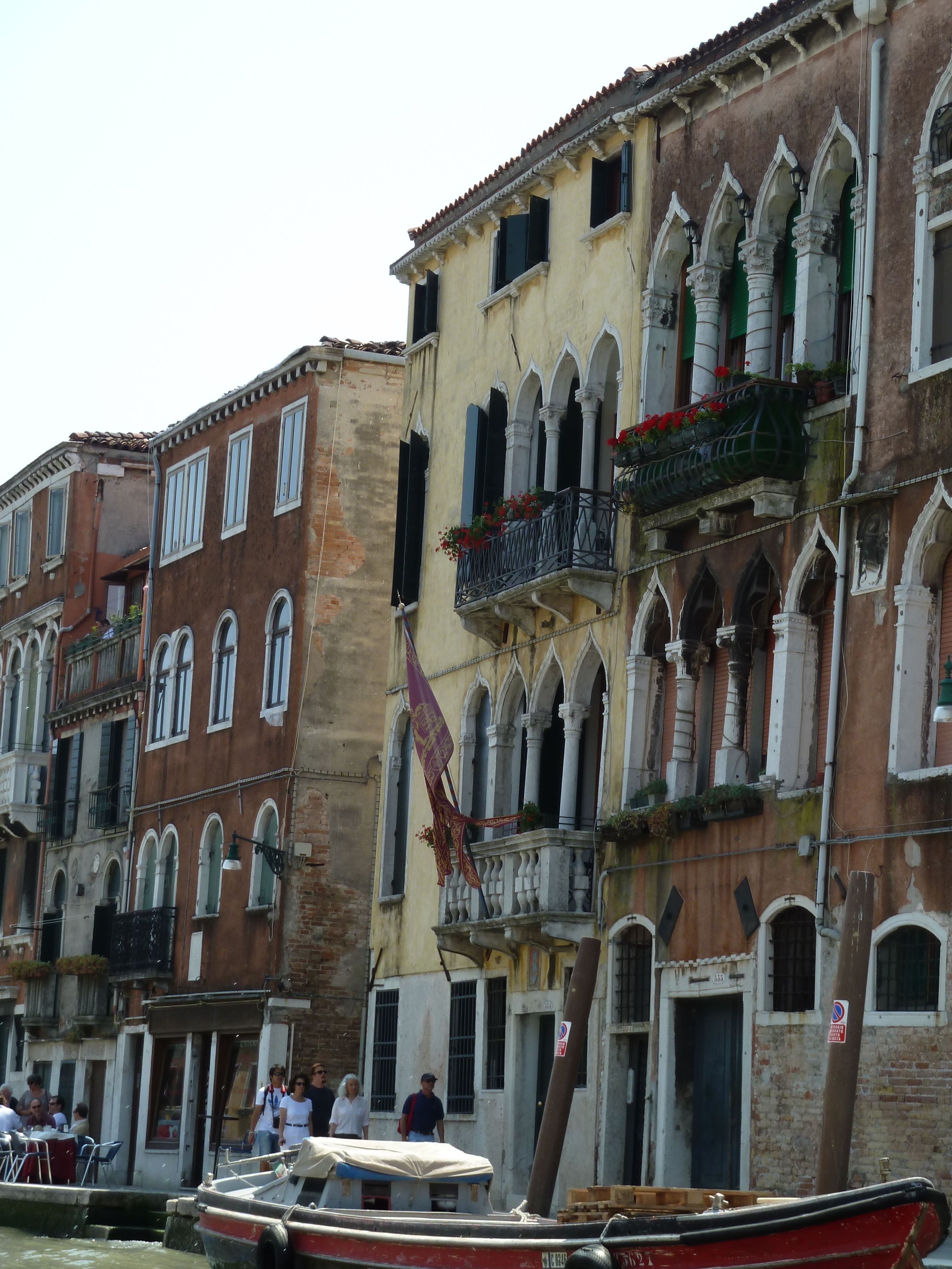 Palazzetti Cendon (Venice)